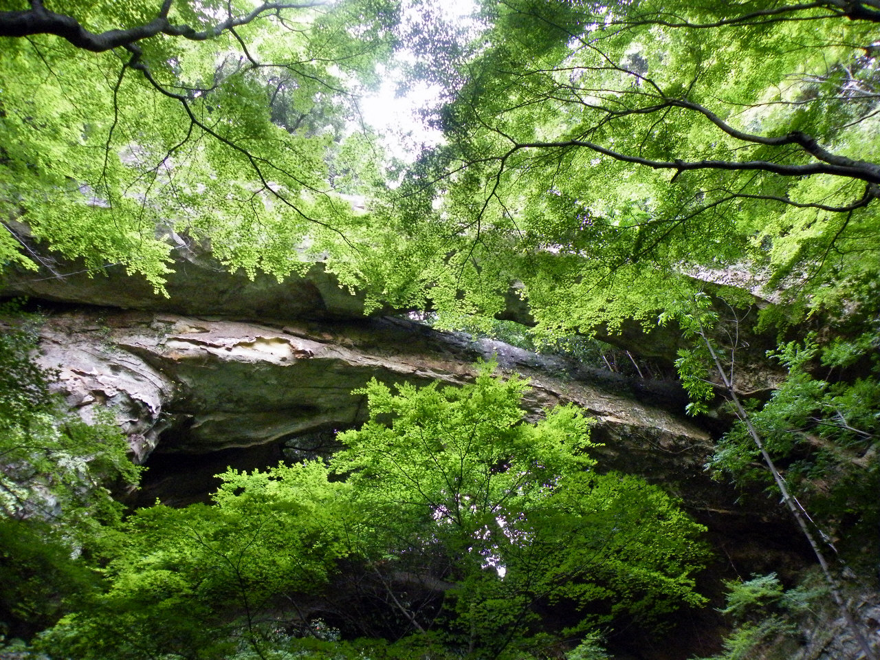 御橋観音（北松八景・長崎県佐世保市吉井町）